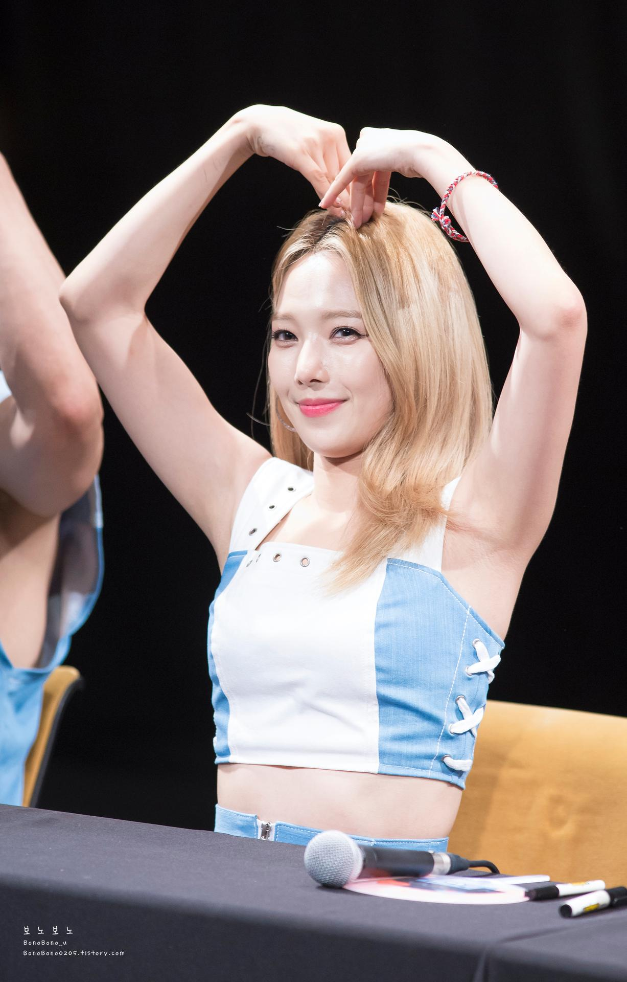 170730 KARD 강남 팬싸인회